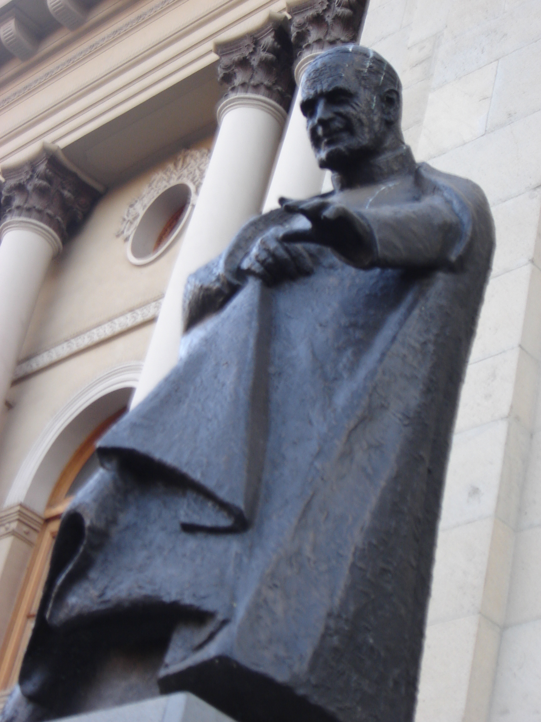 La fotografia es trabajo propio del autor